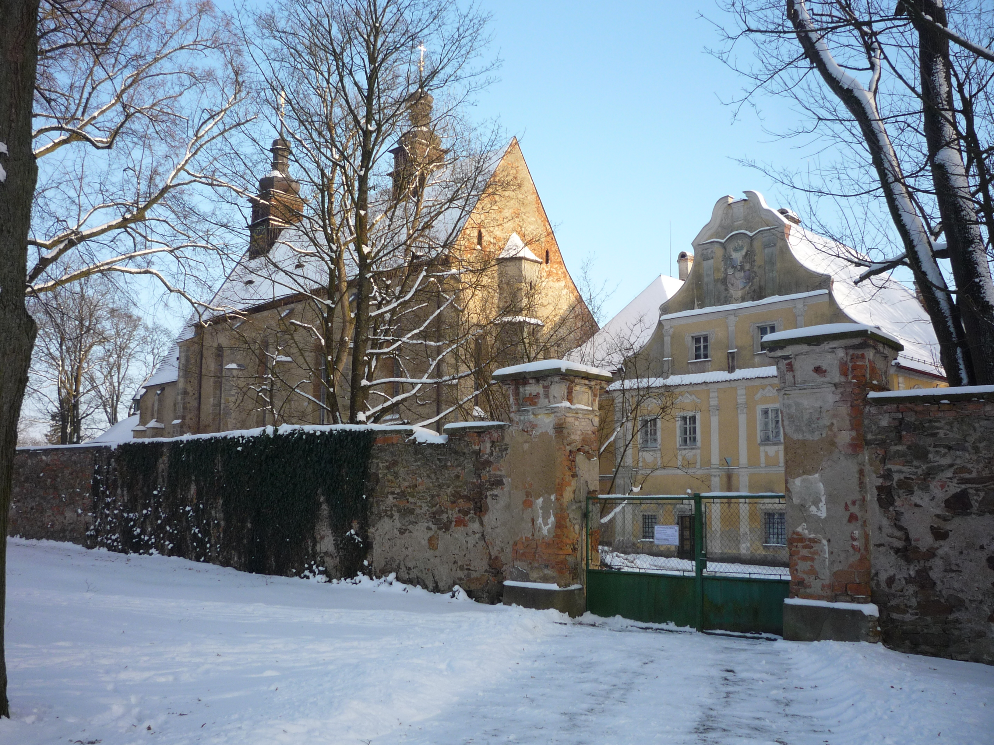 Autor fotografie Jiří Zelenka. Zámek, park a kostel. Obec Pohled. Okr. Havlíčkův Brod. Kraj Vysočina. Czech Republik. Text popisující prelaturu najdeme v knize - Bývalý cisterciácký klášter v Pohledu (německý překlad kroniky - P. Matyáš Maria Pfeyfar ). Přepracované dílo text - M.Bořilová, J.Havlíček, Z.Klementová, J.Novotný, M.Tajovský, J.Pokorný a v. Zeman - obrázky M.Morice a fotografie autorský archiv - Wikimedia Commons.